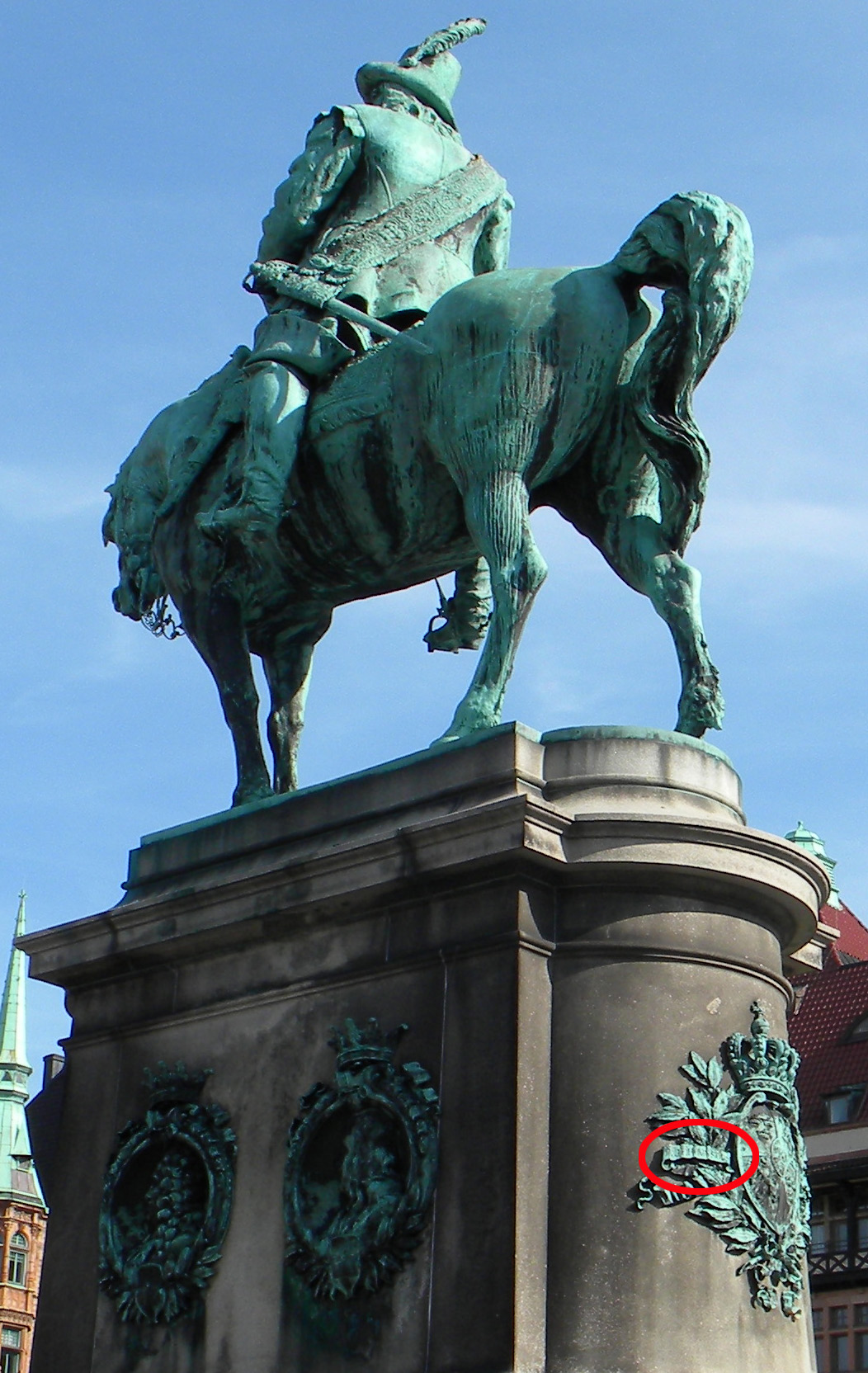 Karl X Gustav i Malmö och hans valspråk